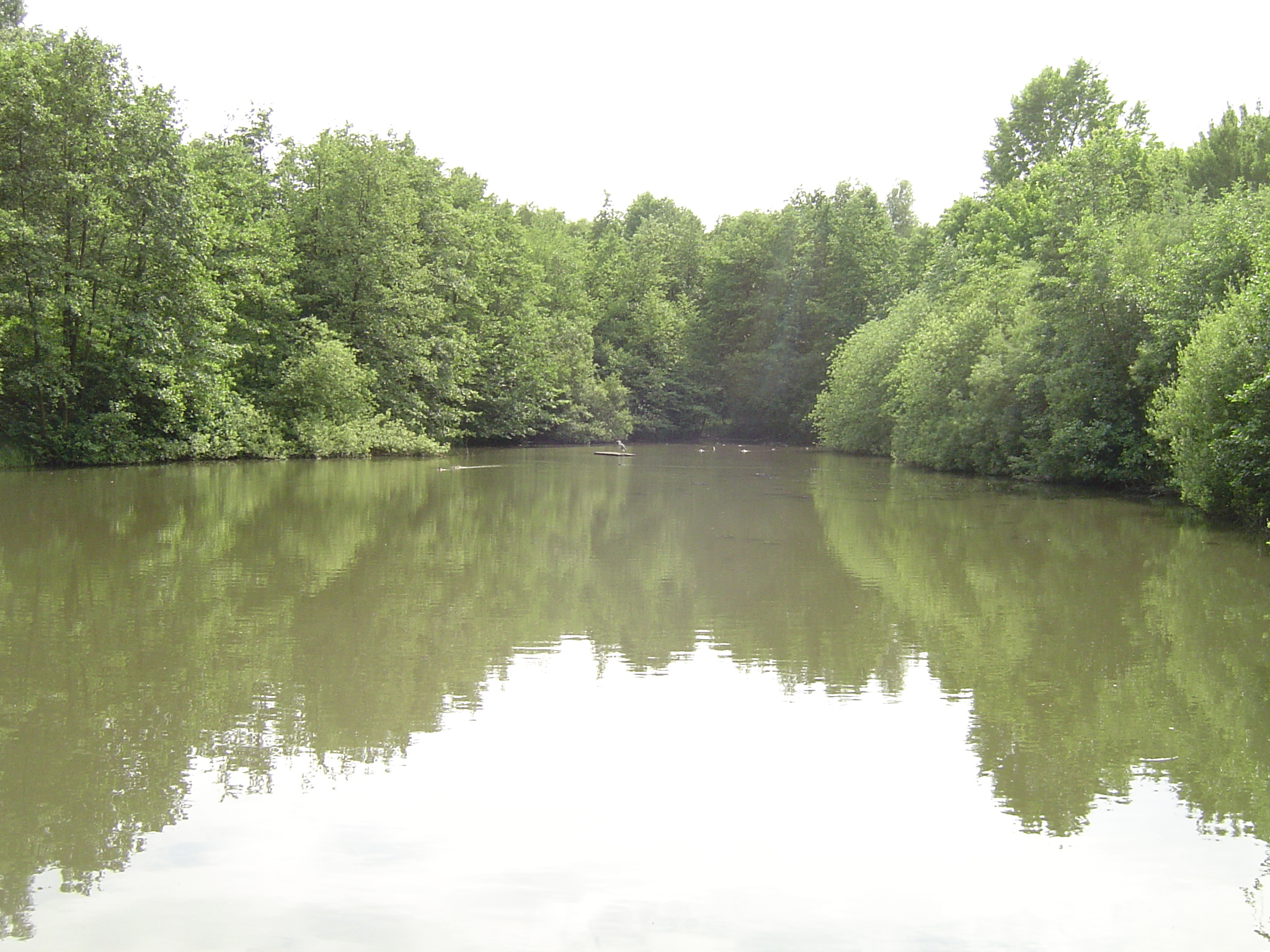 Stausee im Naherholungsgebiet Nathebachtal in Dortmund-Aplerbecker Mark